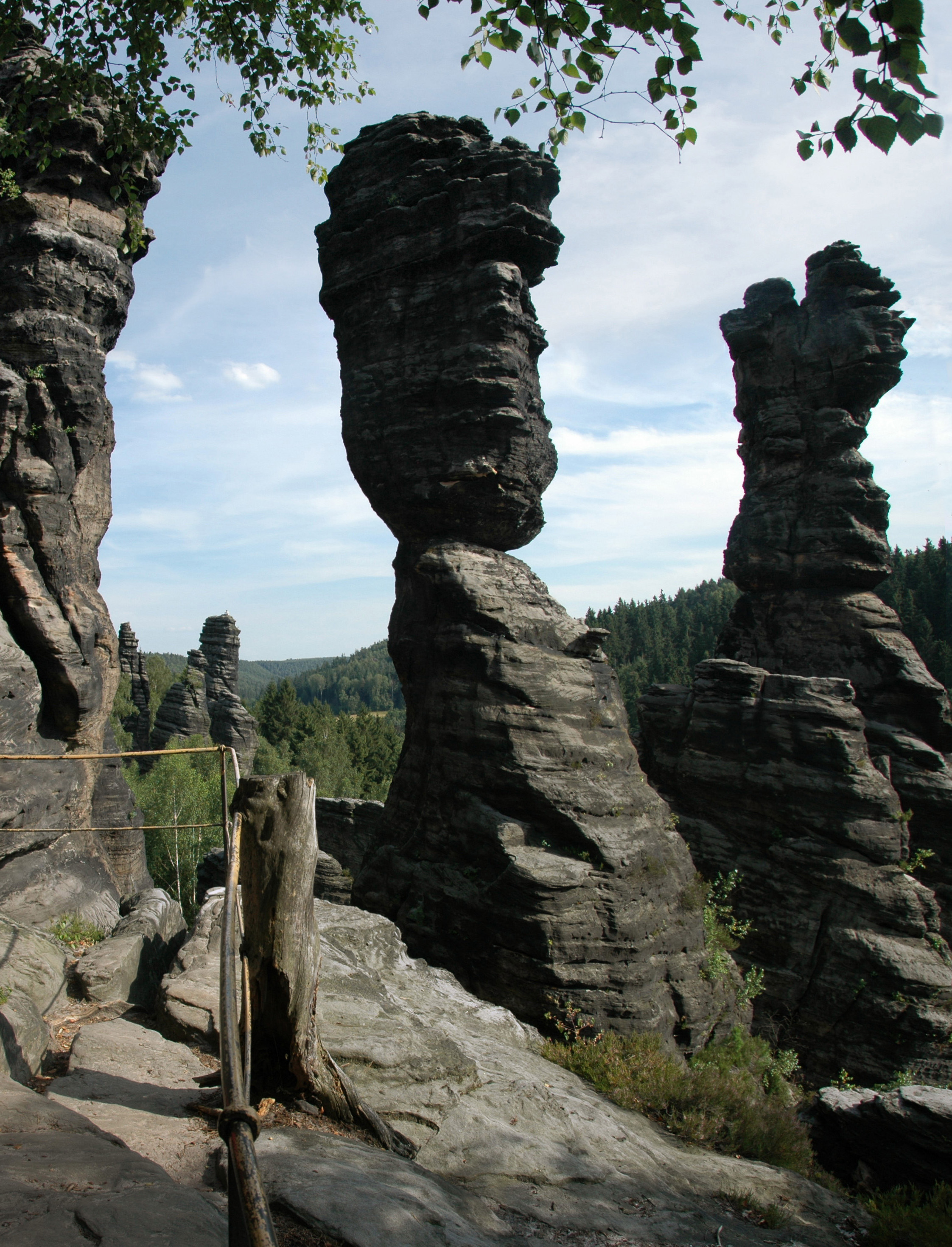 Die beiden Herkulessäulen im Bielatal, südlich von Königstein in Sachsen, rechts die kleine, in der Mitte die große Herkulessäule, fotografiert vom Aussichtspunkt, dessen Geländer links im Vordergrund zu sehen ist.